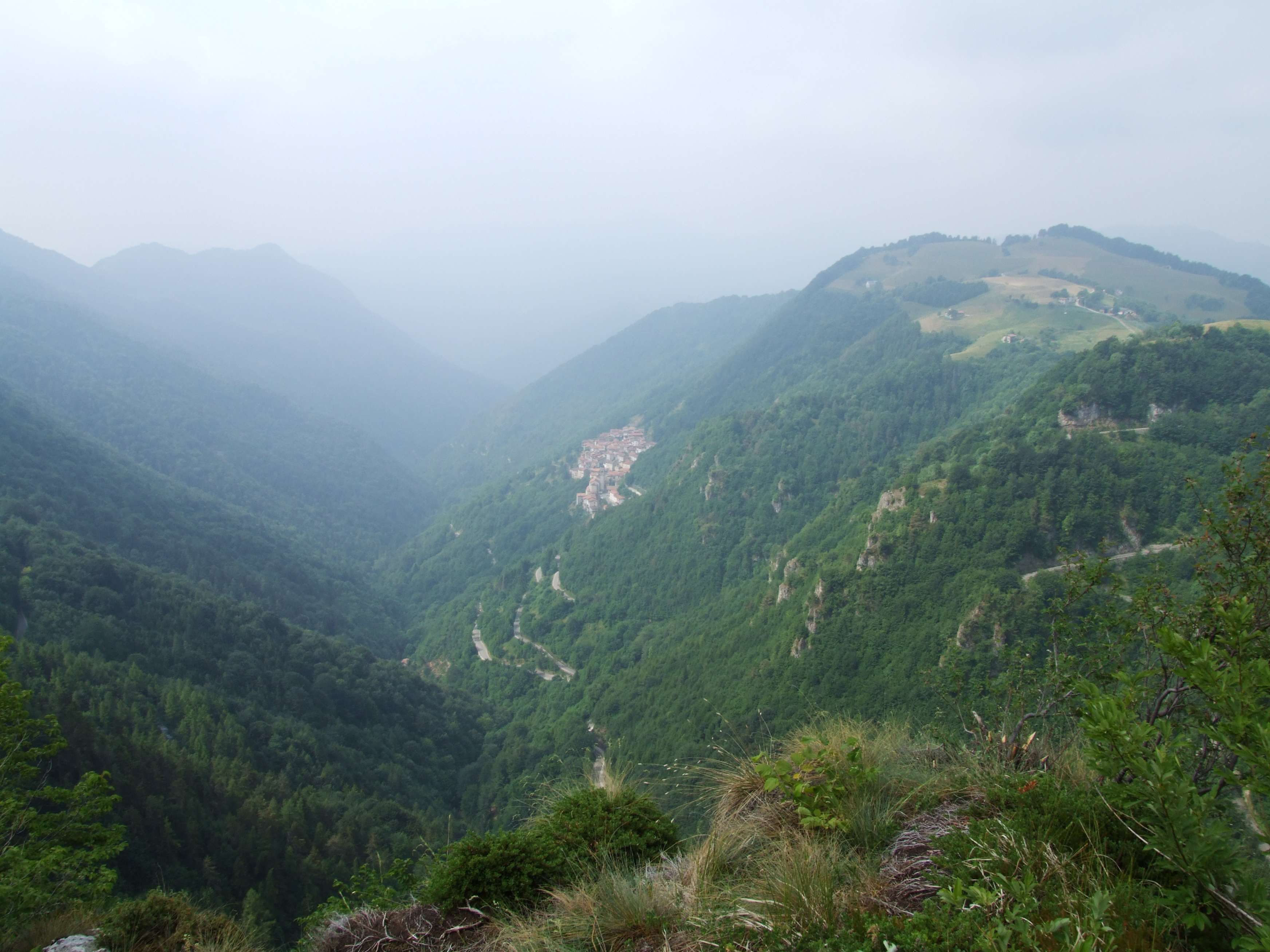 Magasa